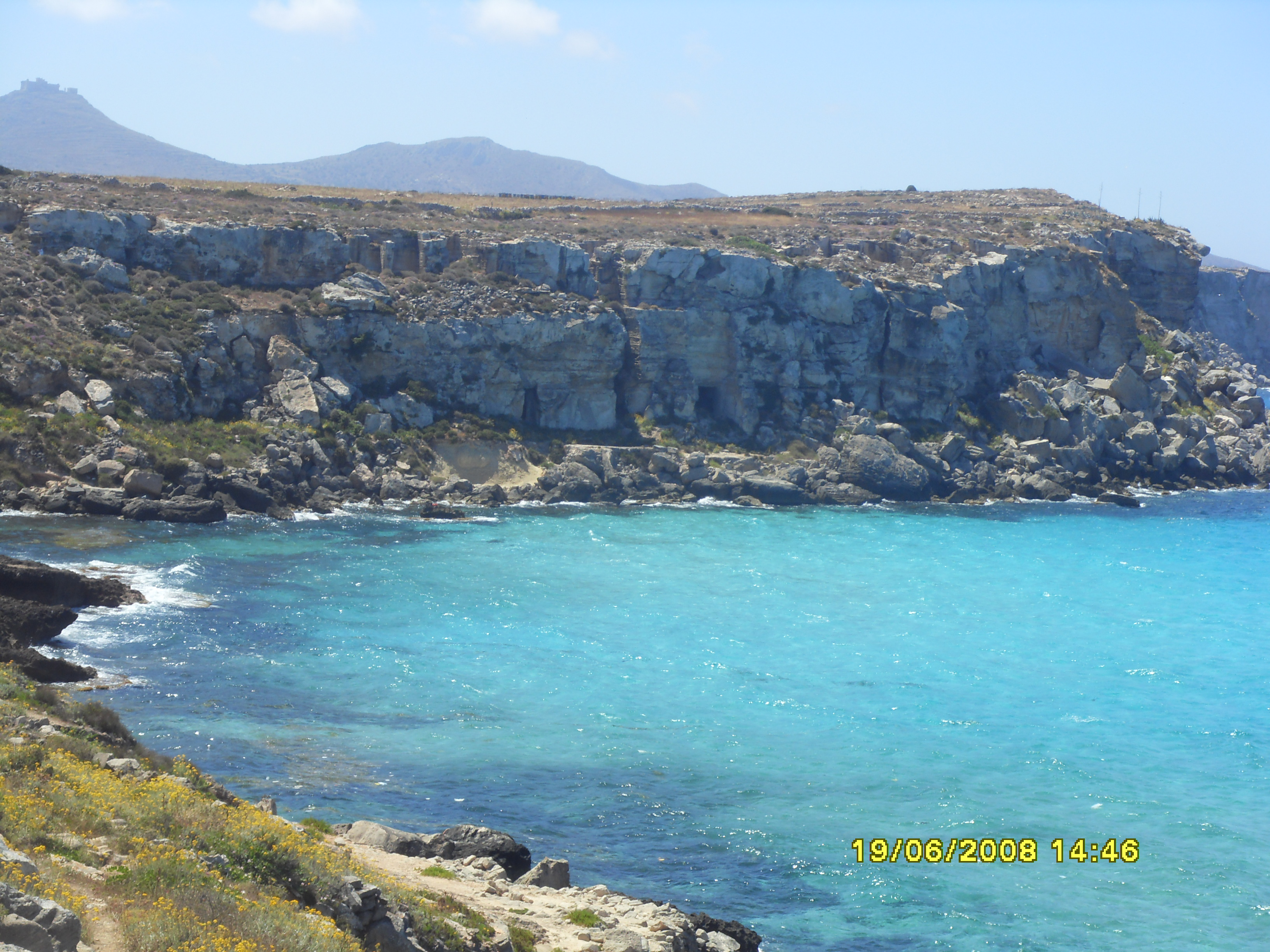 Questo file raffigura Cala Rossa a Favignana (TP)